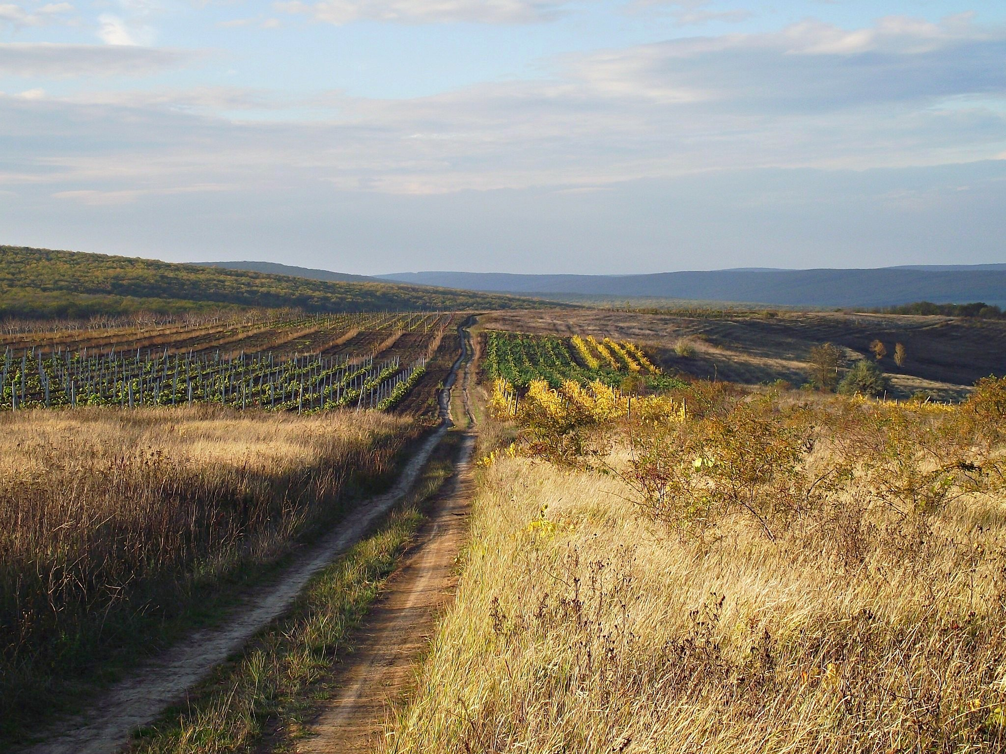 дорога ведет вглубь Кодр